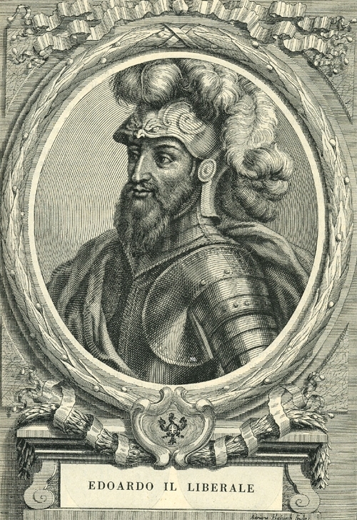 Edoardo di Savoia (1284 - 1329)